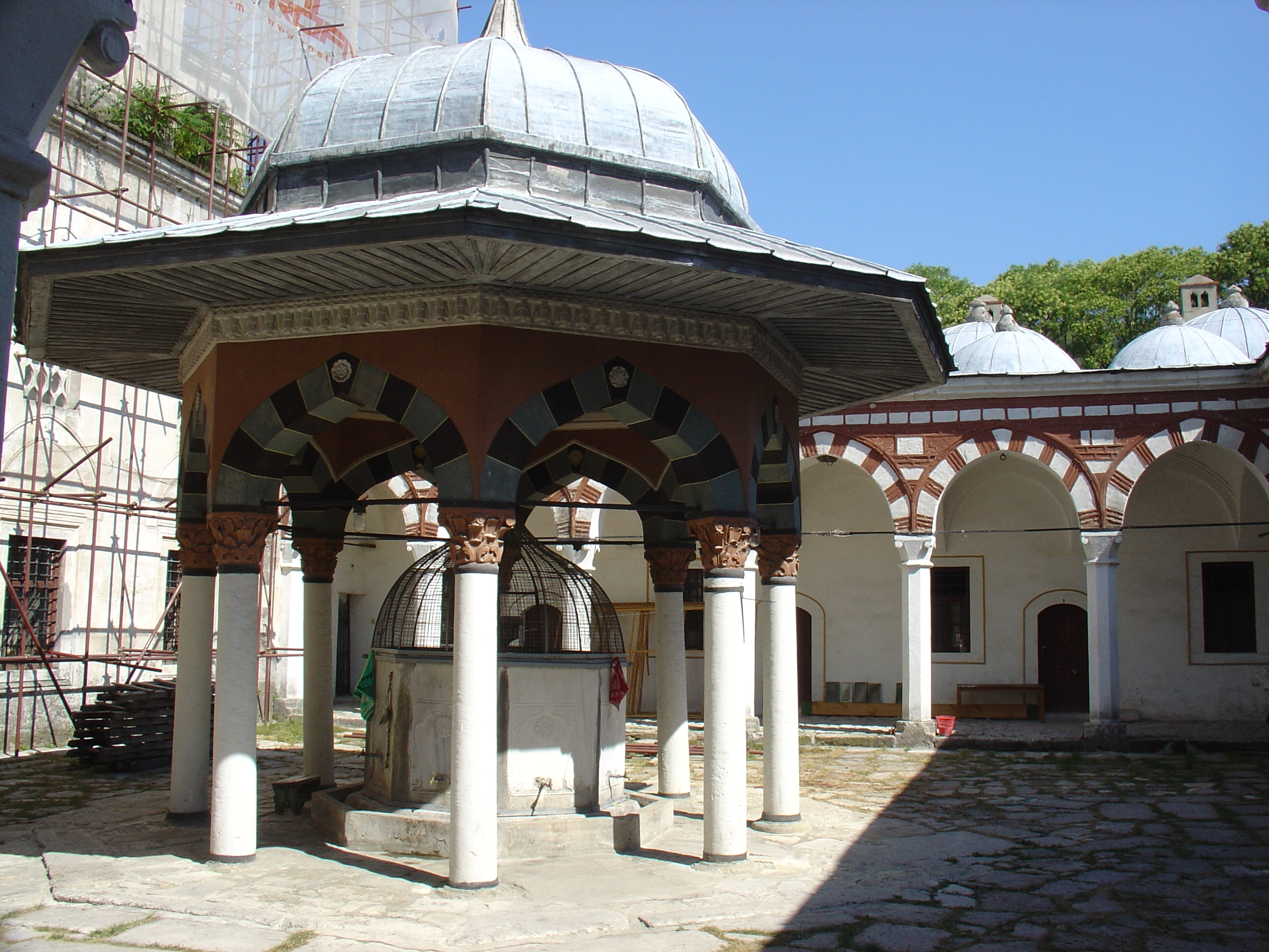 Cour intérieure de la mosquée de Tombul dont la construction date de 1744. Choumen (Bulgarie)